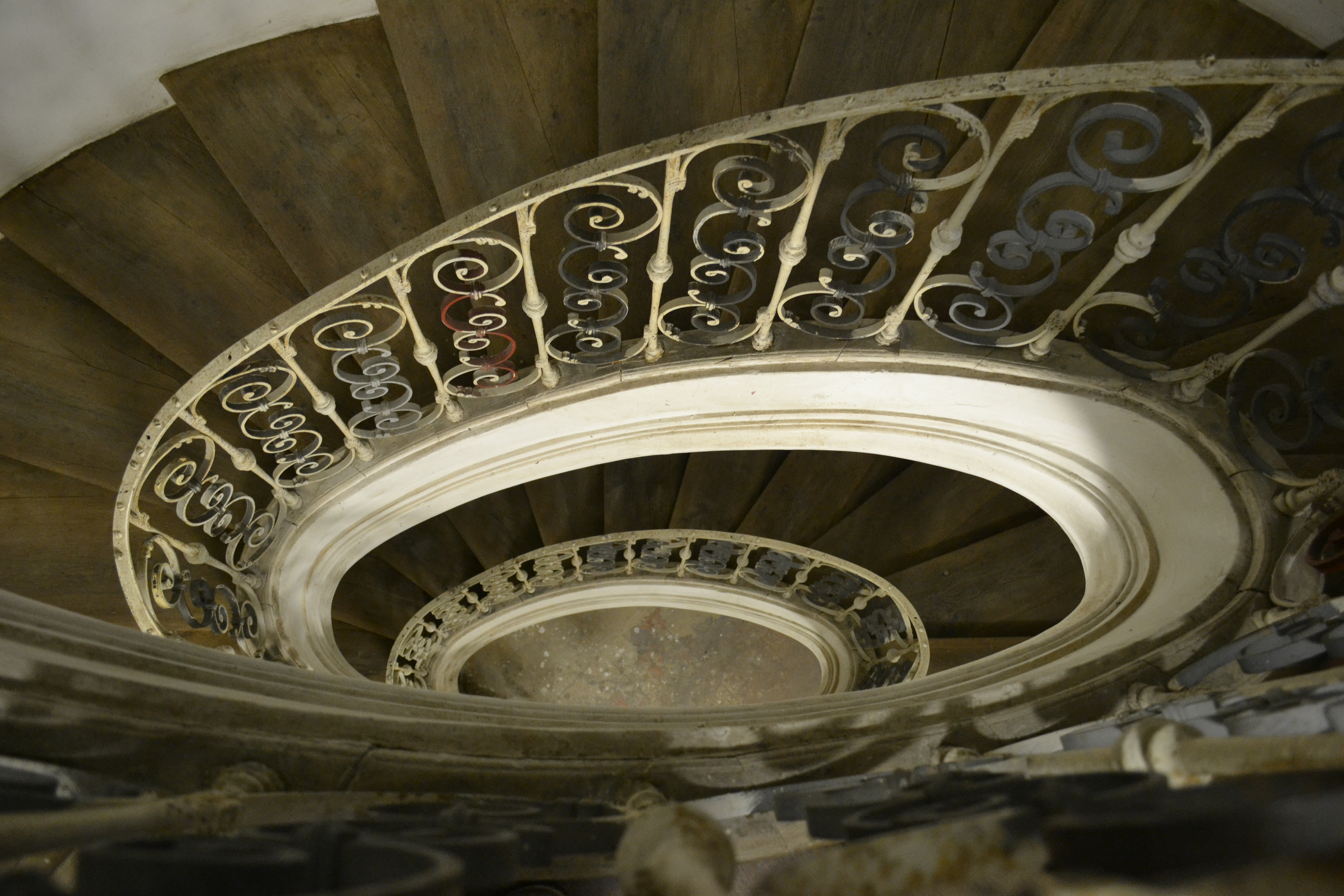 Šnekovité schodiště